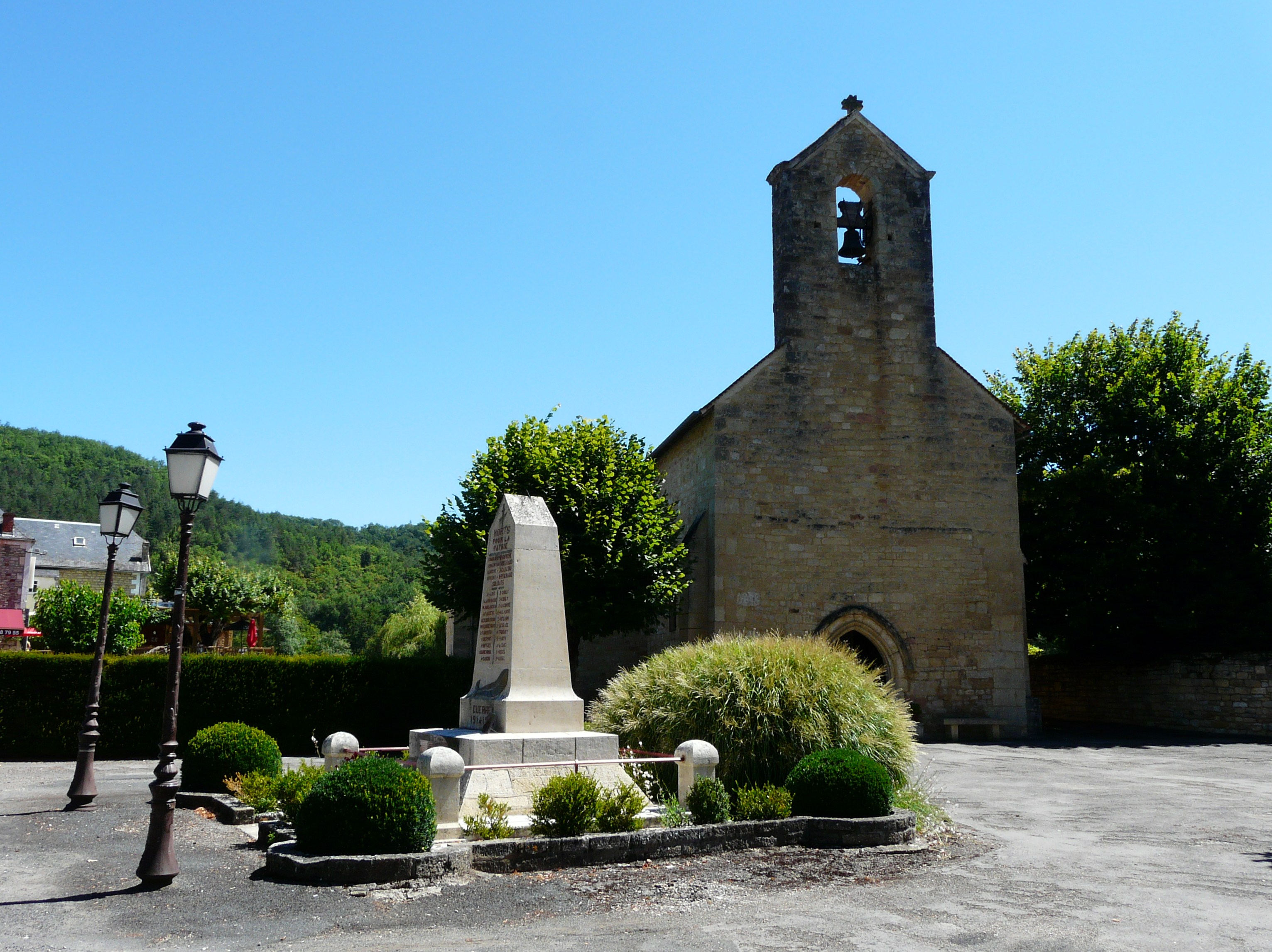 Le monument aux morts et l'église de Saint-Cybranet, Dordogne, France.